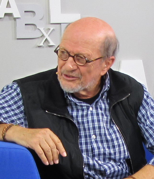 Zeichner Mordillo auf dem Blauen Sofa der Frankfurter Buchmesse, seinen Band Auf die Liebe! vorstellend